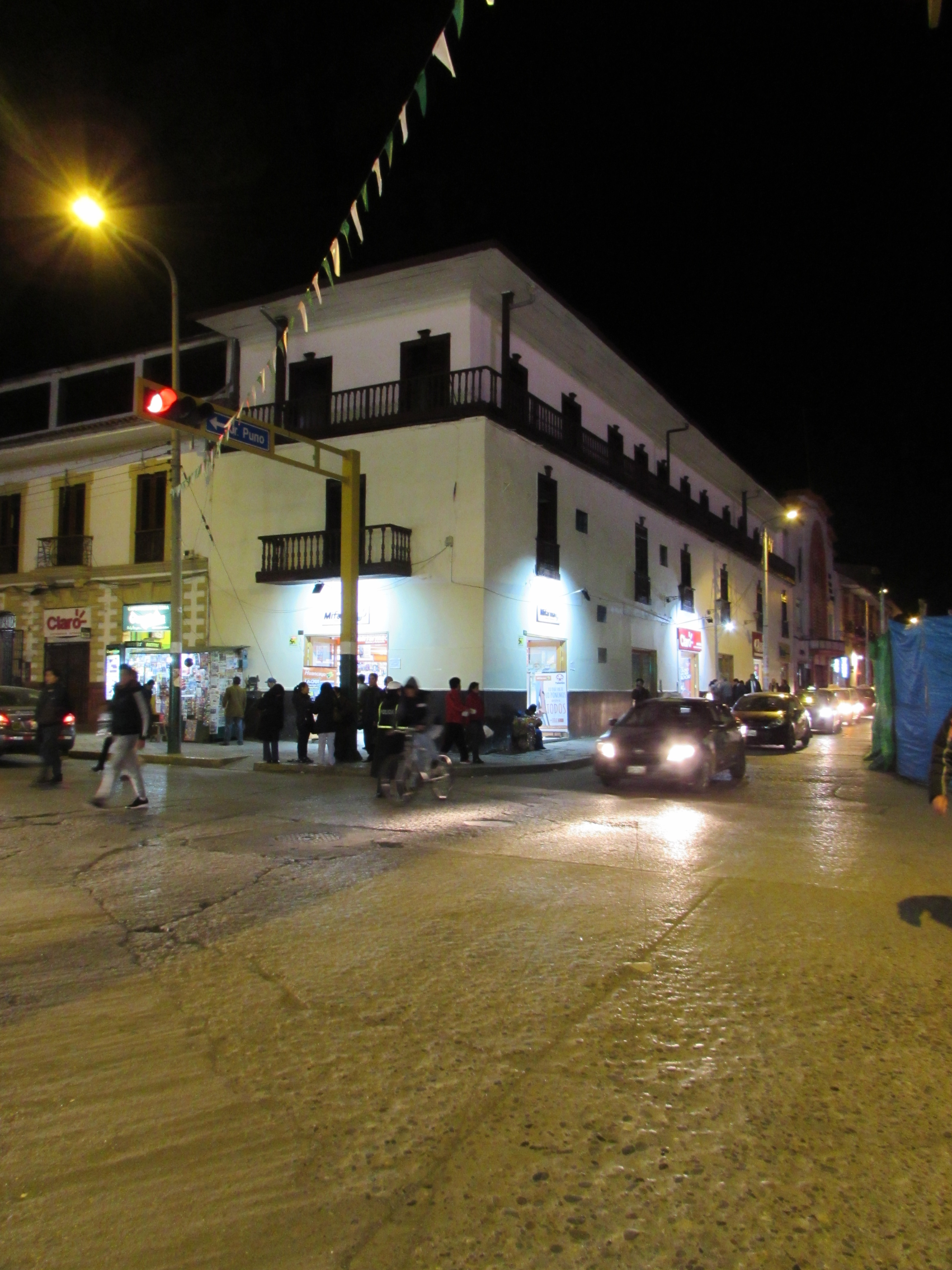 En 1947 se llamó Hotel Victory; para la década de 1980 cambia al nombre de Hotel Tívoli y por último al de Hotel Palermo.